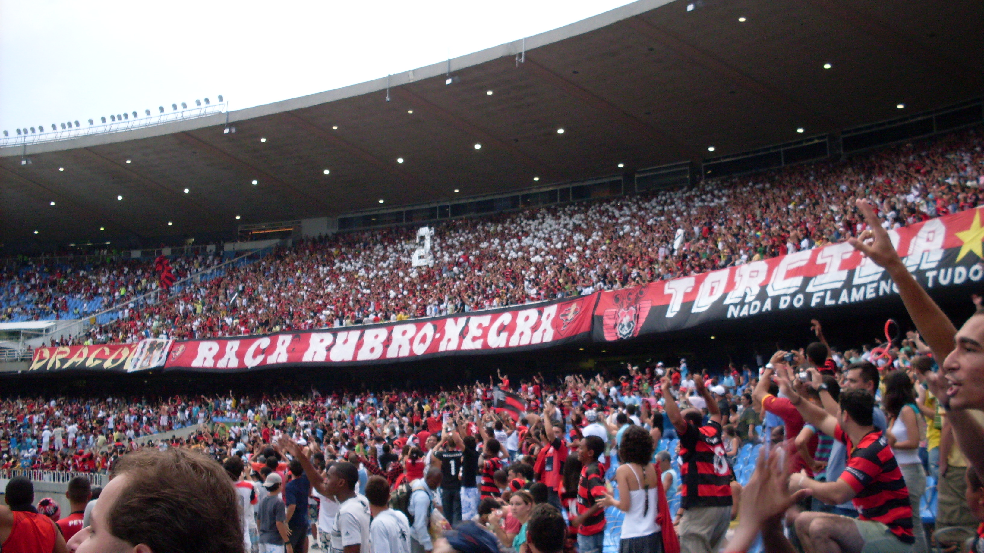 Los hinchas del Flamengo de Río de Janeiro hacen la fiesta en el Maracaná.